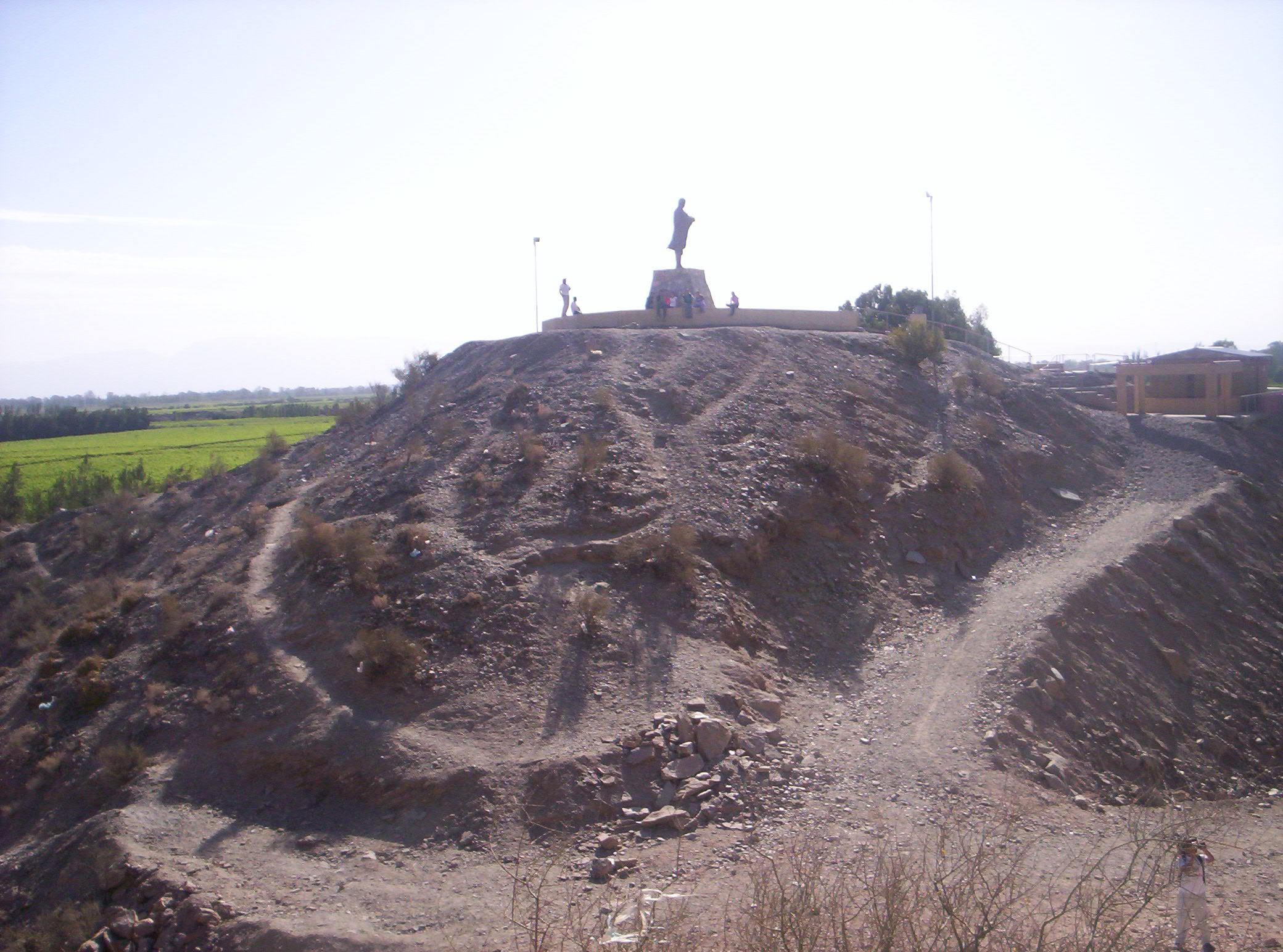 Vista del monumento a Ceferino Namuncurá, ubicado en el piedemonte de las Serranías de Pie de Palo, en la Villa Dominguito, departamento San Martín, provincia de San Juan, Argentina